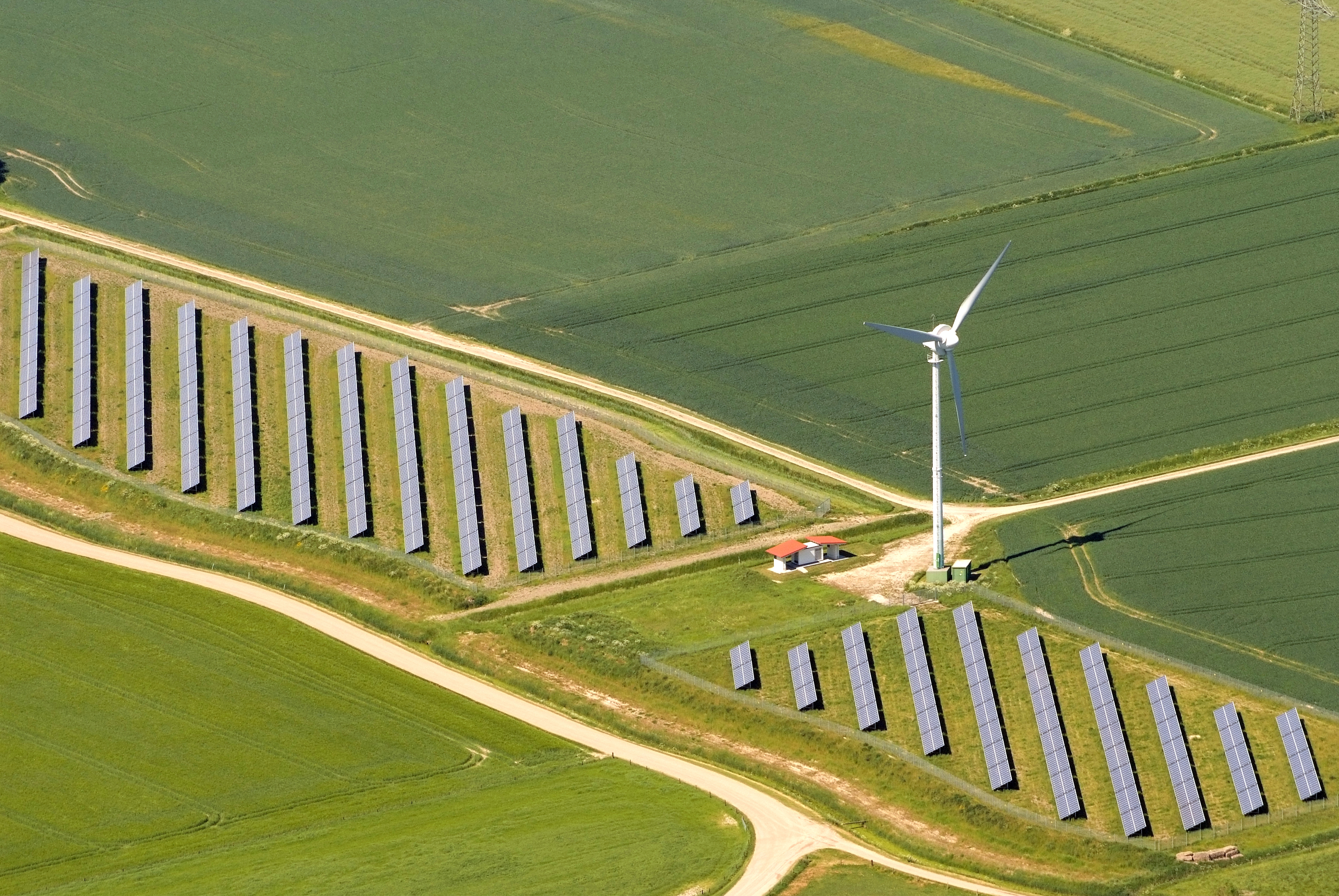 Photovoltaikstation bei Hooksiel Fotoflug vom Flugplatz Nordholz-Spieka über Cuxhaven und Wilhelmshaven